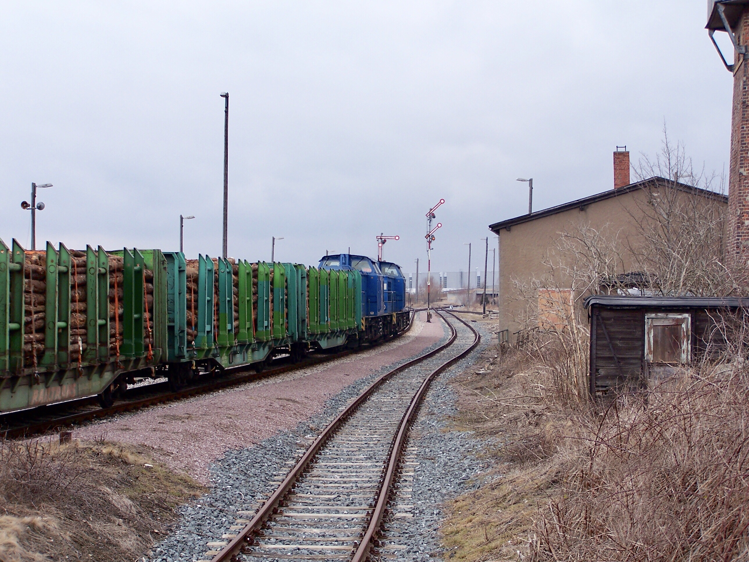 Holzzug im Bahnhof Ohrdruf